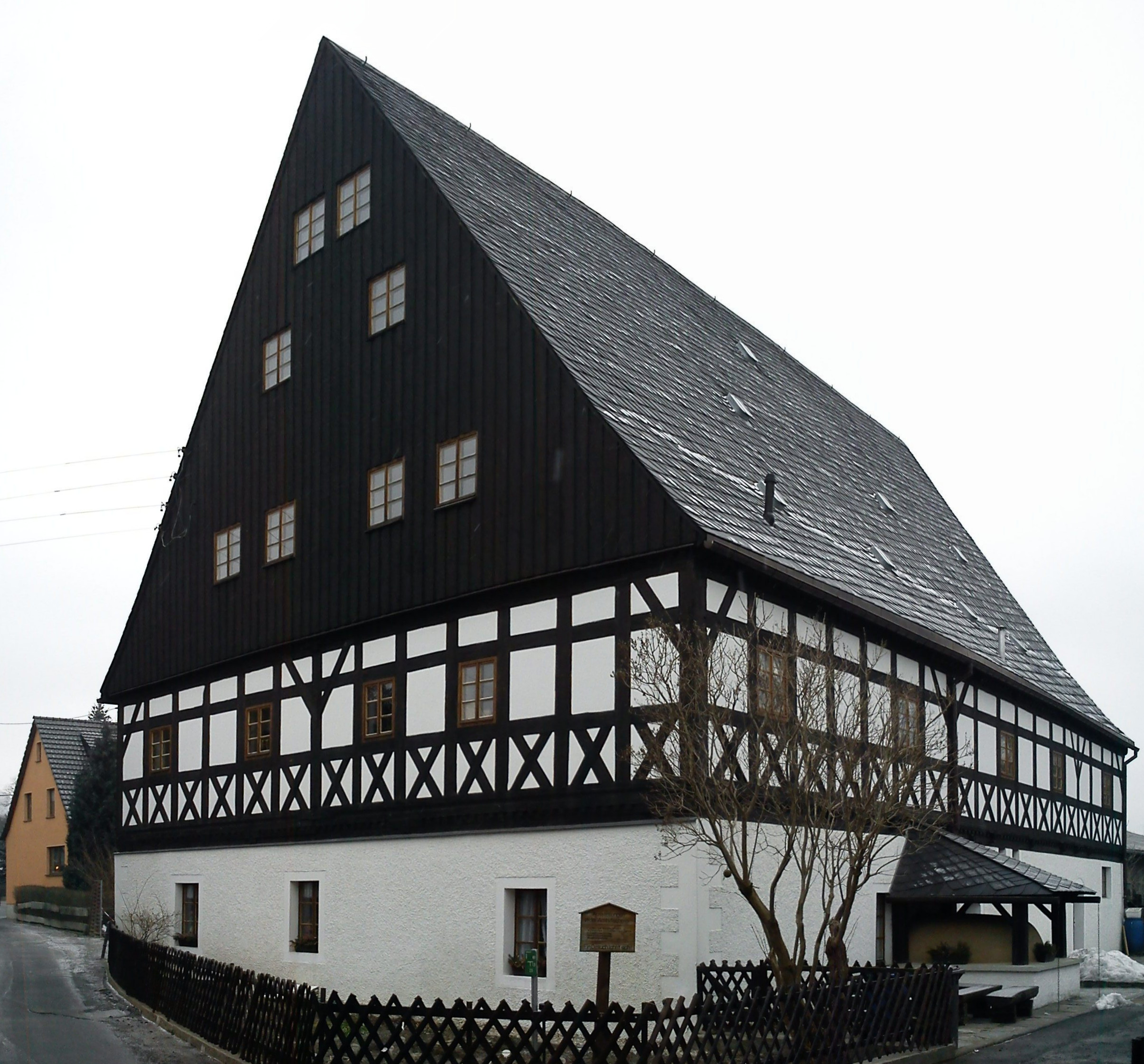 Kurfürstliche Amtsfischerei von 1653 in Pockau - heute Museum und Vereinshaus